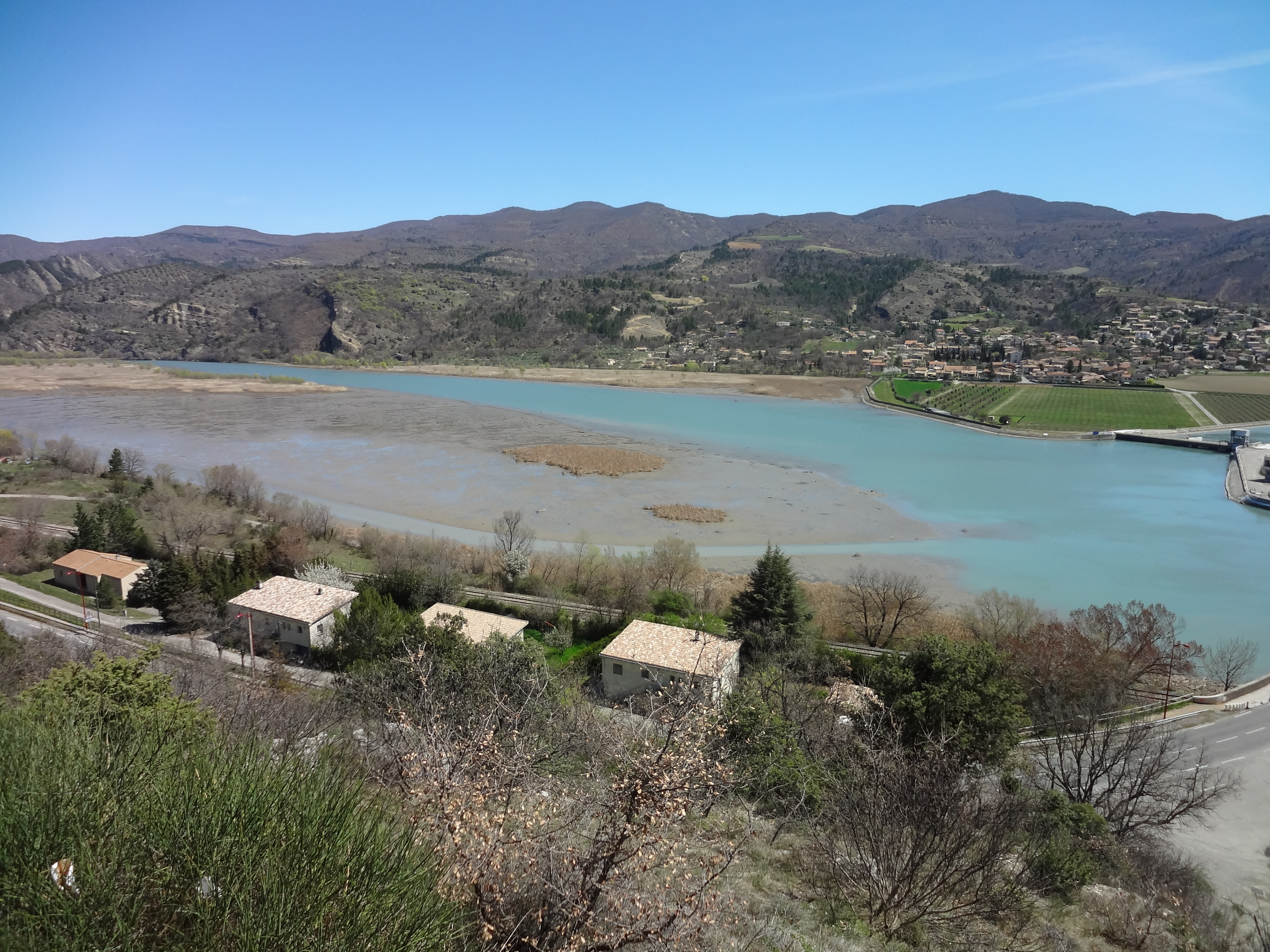 Vu du belvédère, proche de la station Total, à Saint-Auban